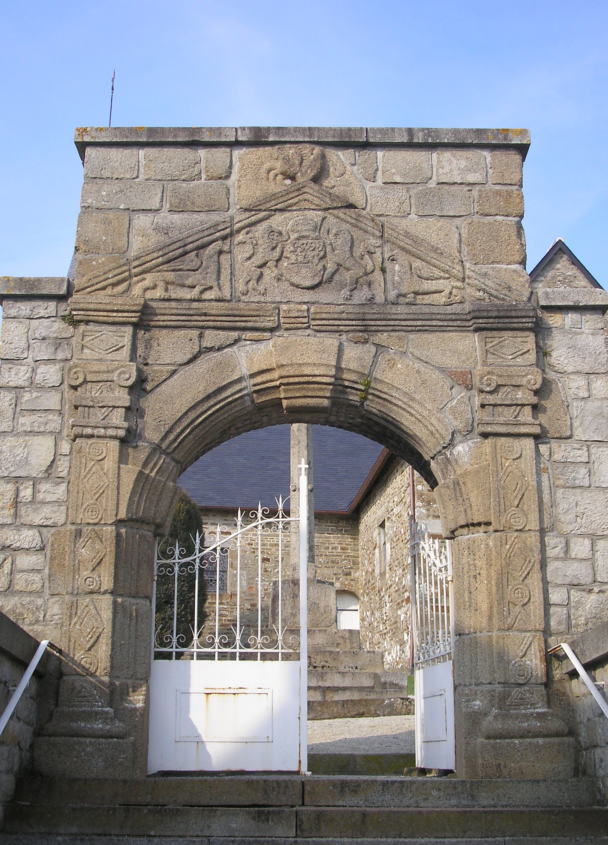 Barenton (Normandie, France). Portail du cimetière de la chapelle Notre-Dame-de-Montéglise.